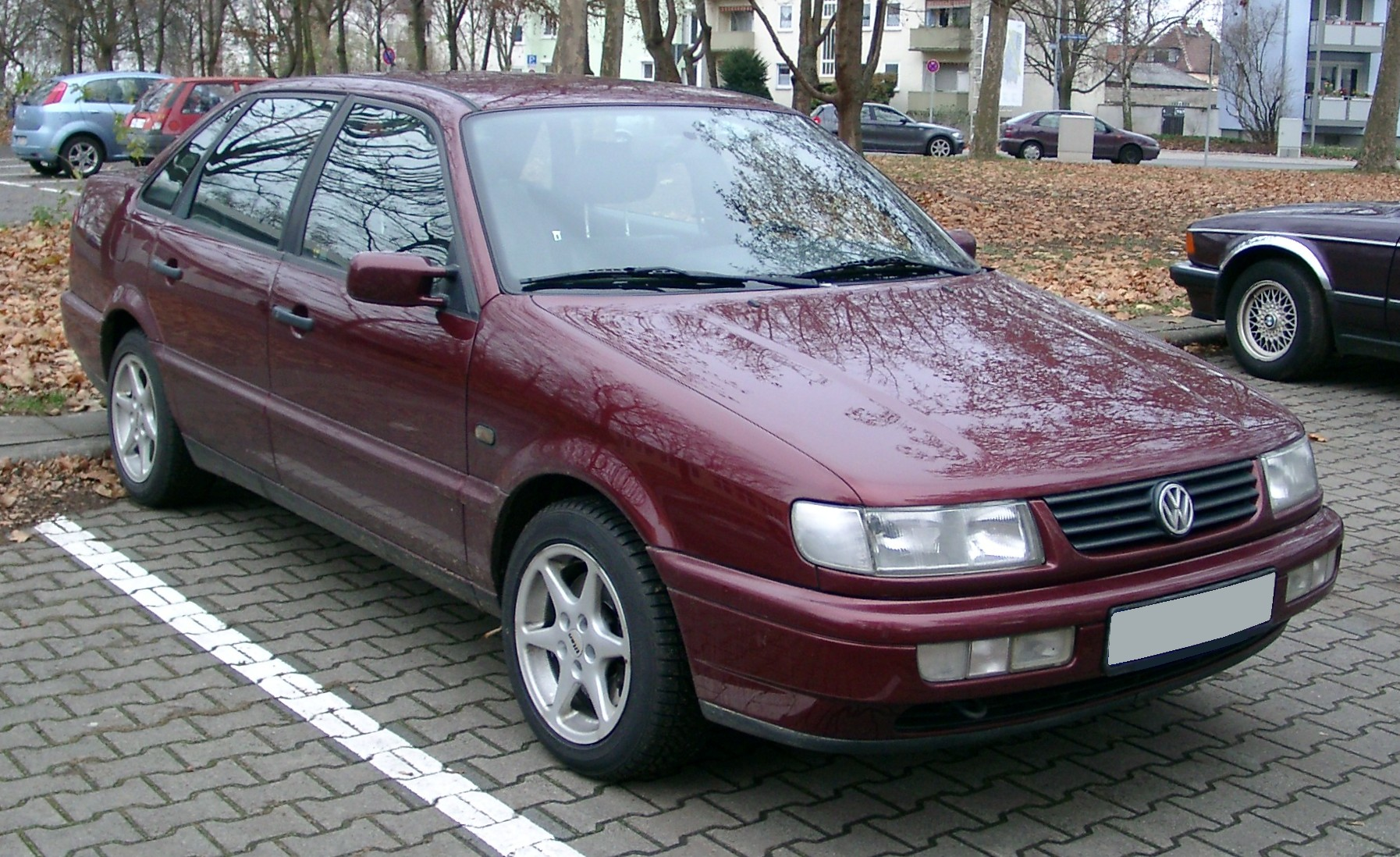 VW Passat B4